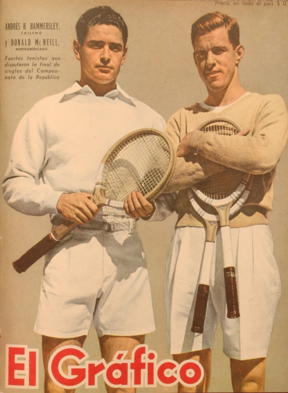 Andrés Hammersley (Chile) y Don Mc Neill (Estados Unidos).